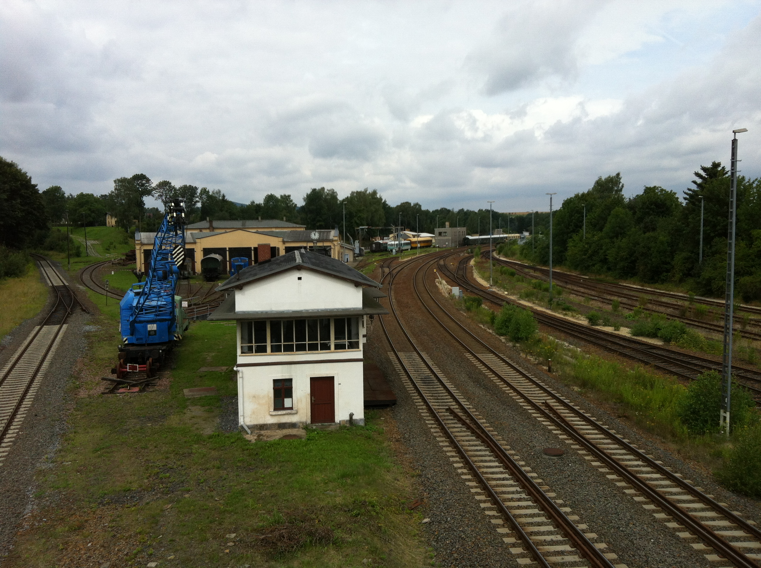 Blick von der Weißenberger Brücke auf die Westausfahrt aus dem Bahnhof Löbau in Richtung Bautzen (rechts) und Abzw. Niedercunnersdorf (links).